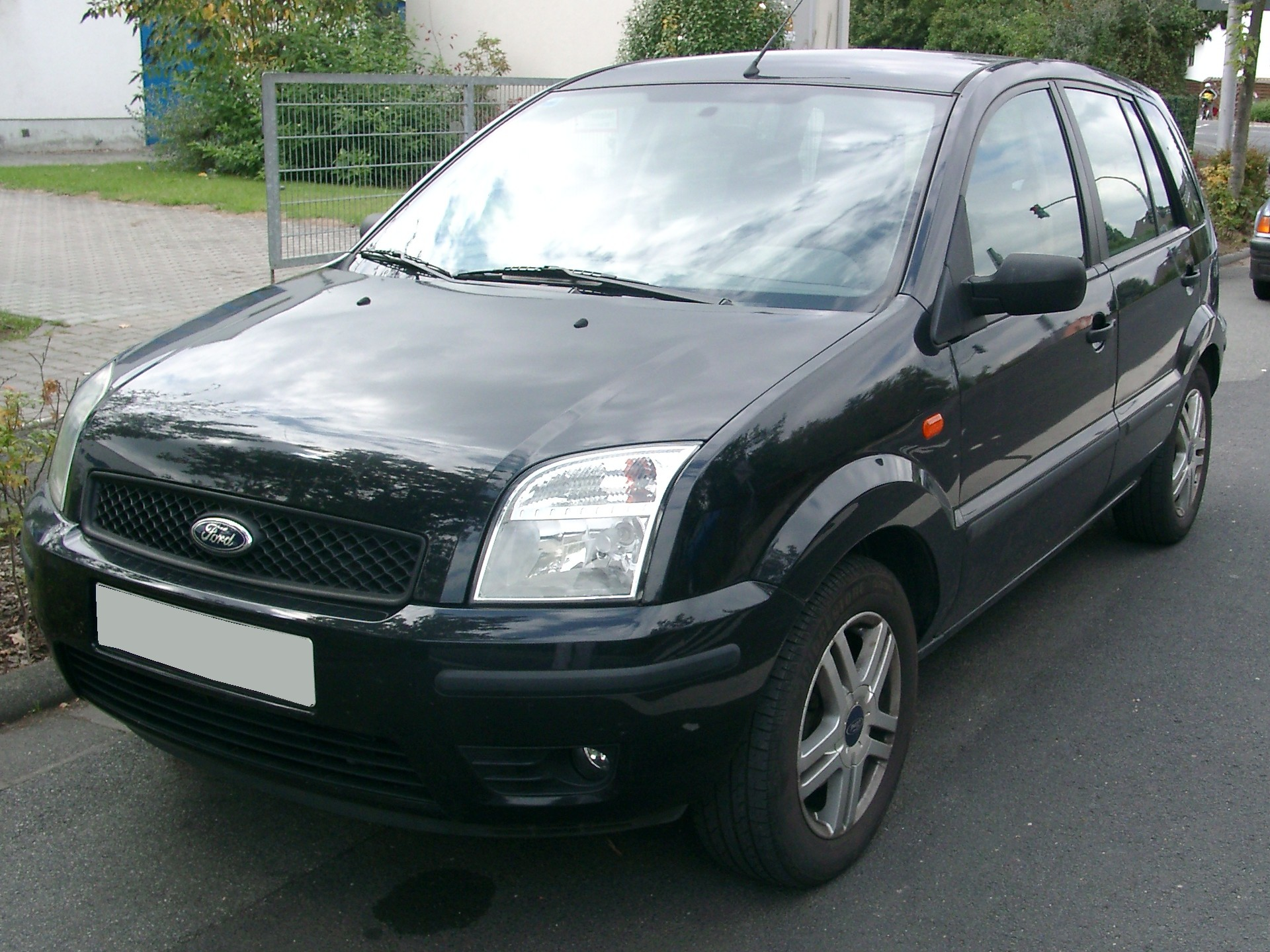 Ford Fusion, Europäische Version